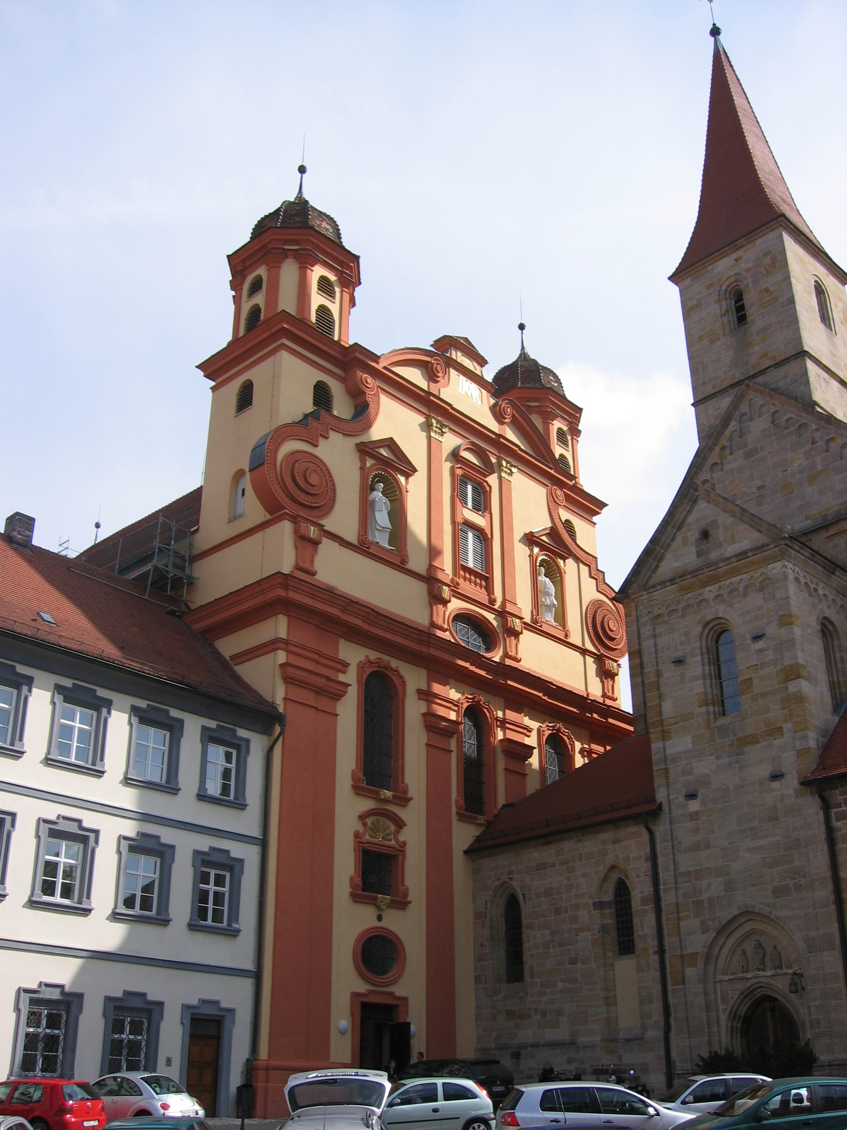 Evangelische Stadtkirche Ellwangen